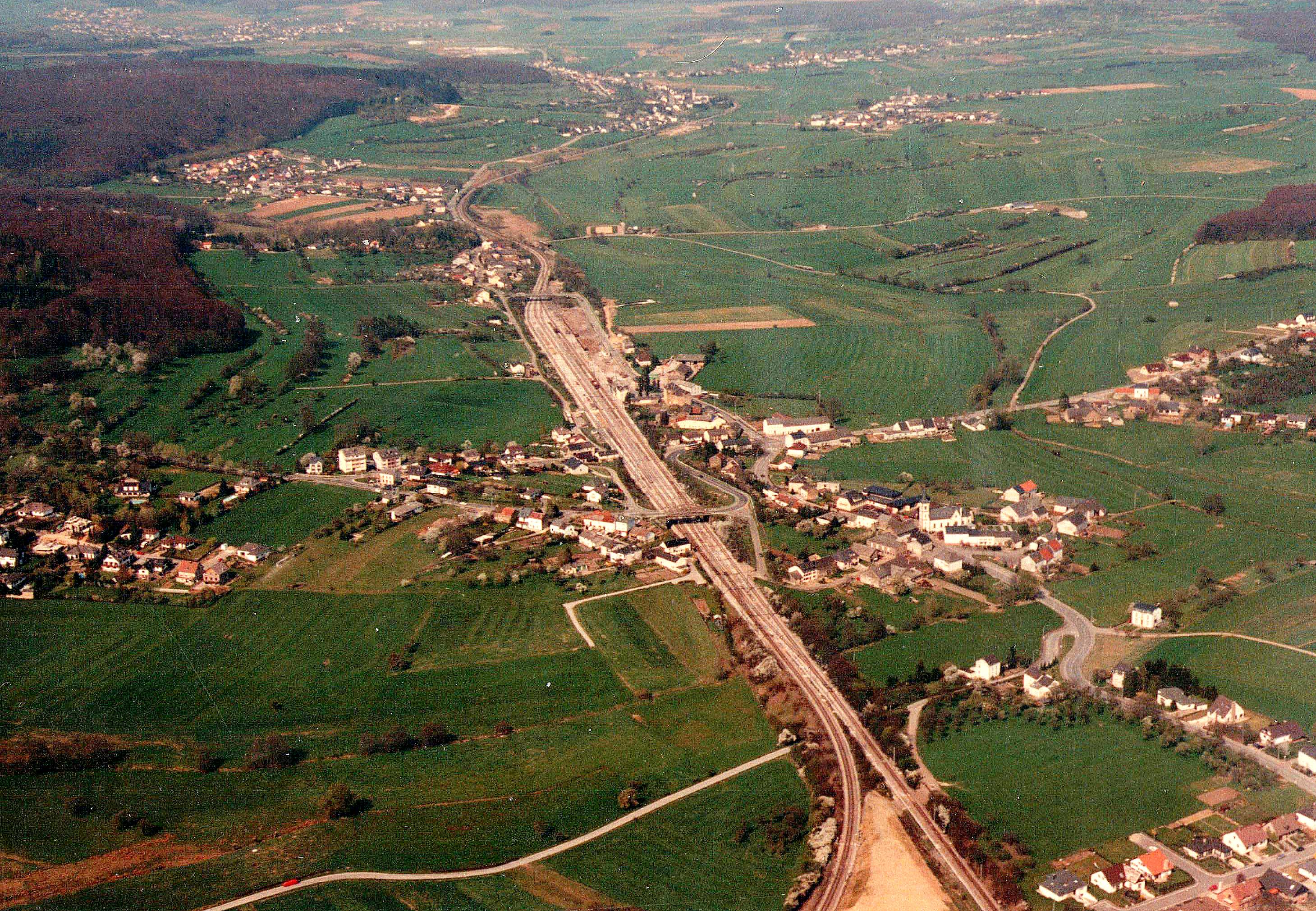 Oetrange et la Gare en 1991